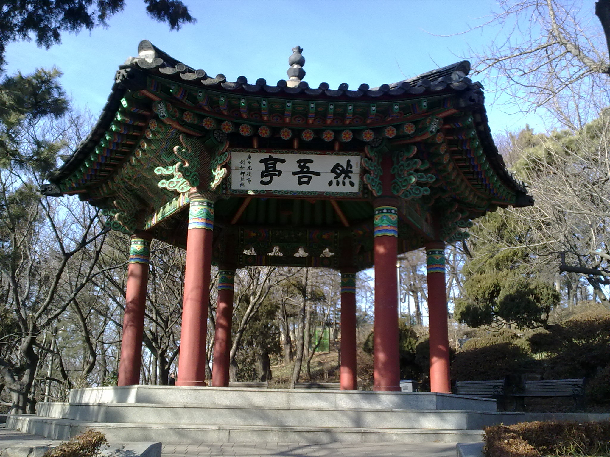 인천 자유공원 연오정